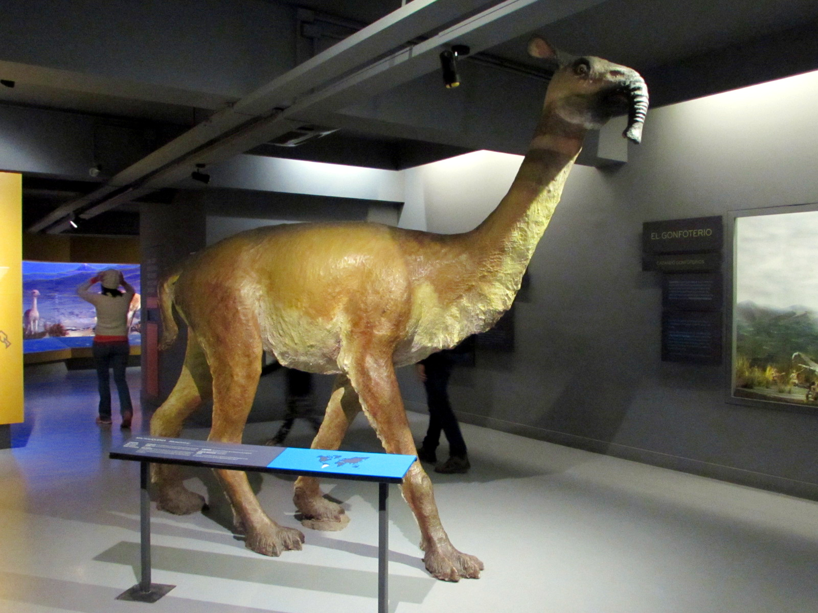 Réplica de Macrauquenia ubicada en el Museo Nacional de Historia Natural de Chile.